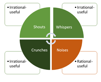 La metodología usada evita el uso de términos como "ideas", "pensamientos", "proposiciones", "intenciones", en su lugar recurre a cuatro metáforas básicas del actuar: el grito, el susurro, el crujido y el ruido.